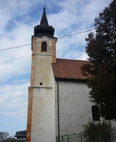 Árpád-házi Szent Erzsébet római katolikus templom Terényben (Nógrád megye, Magyarország